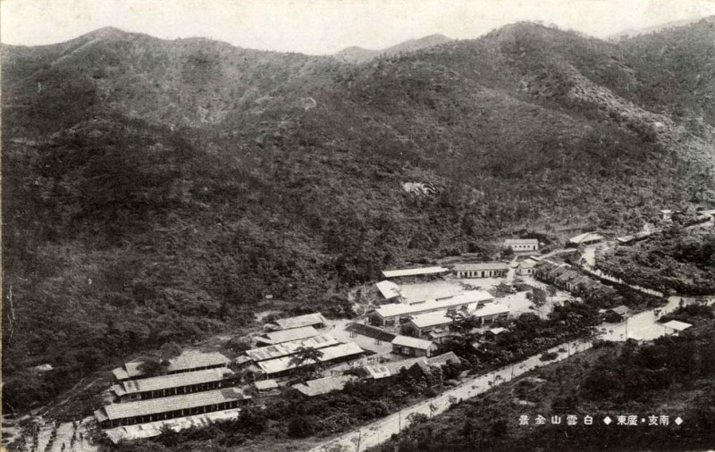 廣州市白雲山全景。